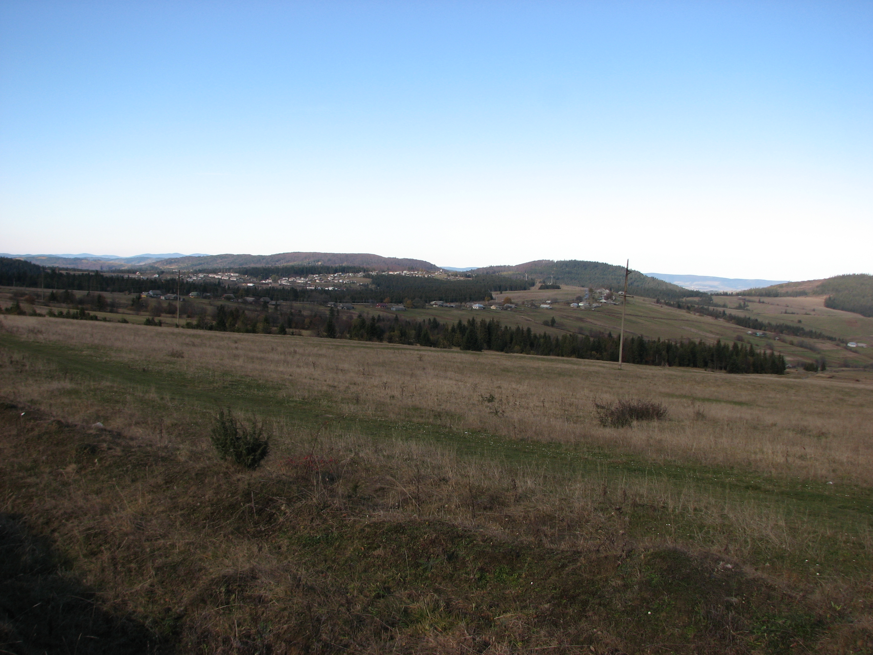 Стрийско-Сянская Верховина